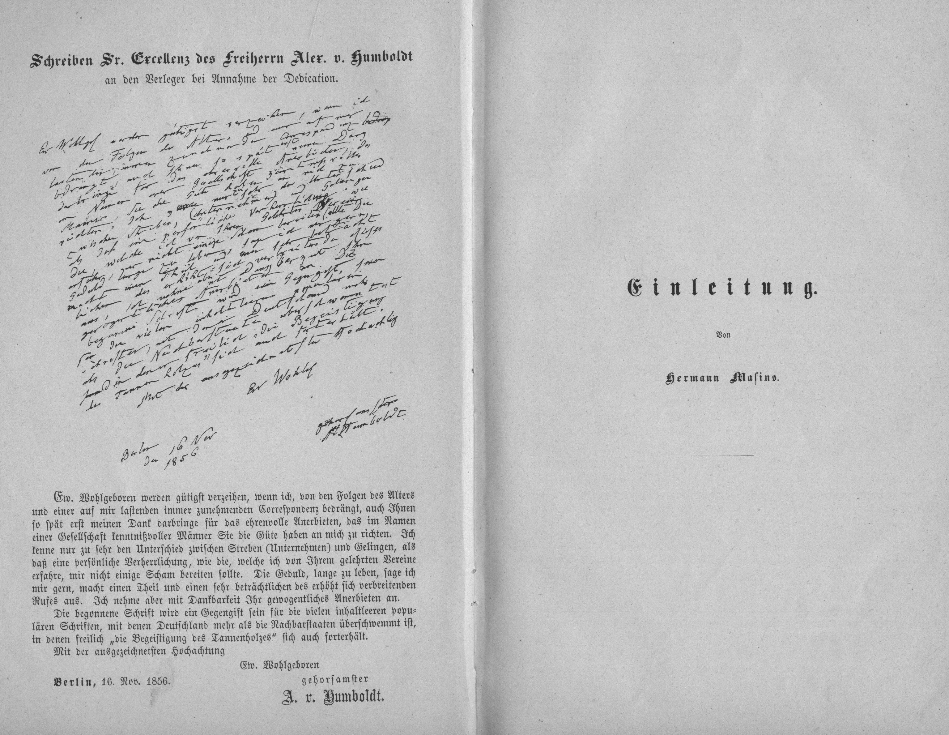 Seite XII Widmung und Seite XIII Inhalt